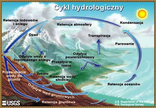 Co rozumiemy pod pojęciem cyklu hydrologicznego? Można powiedzieć, że to "my" w każdej cząsteczce! Cykl hydrologiczny (obieg wody w przyrodzie) opisuje istnienie i ruch wody na, w i ponad powierzchnią Ziemi. Woda na Ziemi jest w ciągłym ruchu i zmienia swoje formy, od stanu ciekłego, poprzez gazowy do stałego i na odwrót. Obieg wody trwa od miliardów lat i całe życie na Ziemi jest od niego zależne.